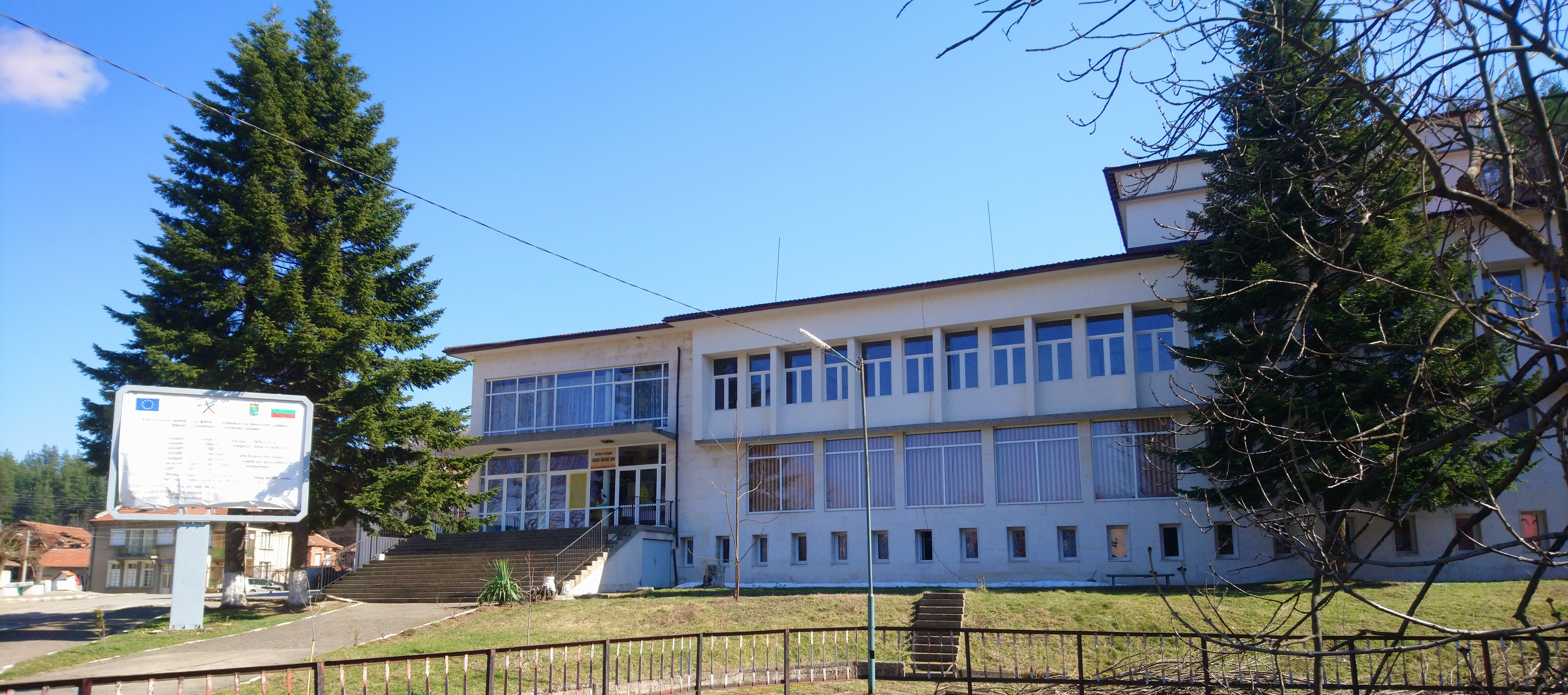 Бързия, Народно читалище Иван Вазов 1911